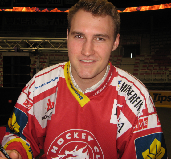 Po zakončení sezóny 2014/15 ve Werk Areně